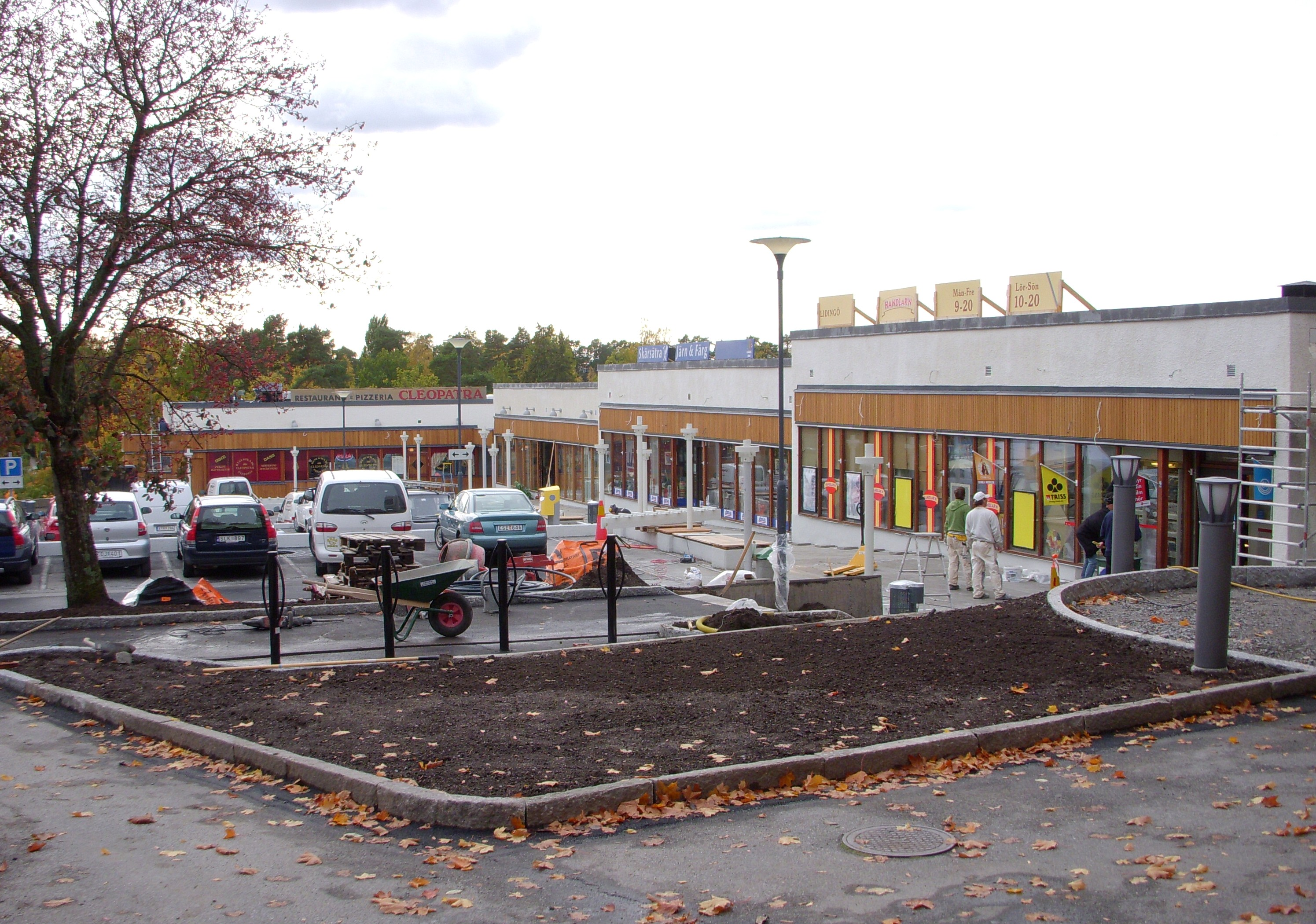 Skärsätra centrum på Lidingö